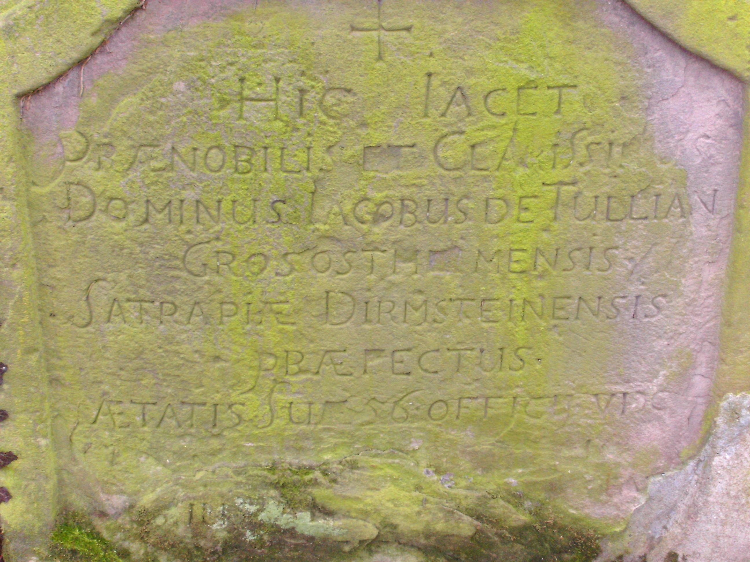 Jakob von Tullian, bischöflicher Amtmann in Dirmstein, Grabstein 1729, Inschrift